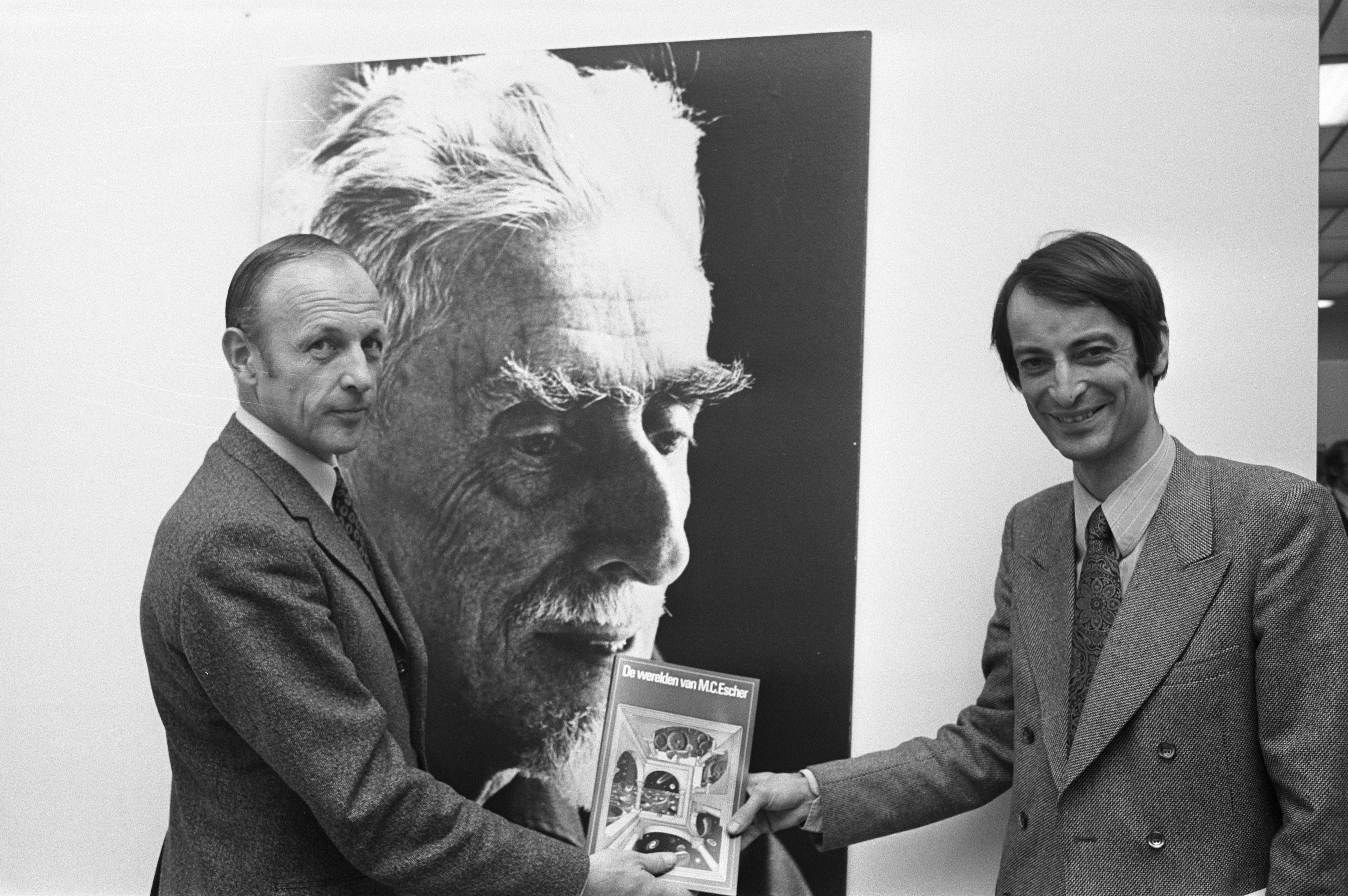 Collectie / Archief : Fotocollectie Anefo Reportage / Serie : [ onbekend ] Beschrijving : Eerste exemplaren van boek "Werelden van M.C. Escher" uitgereikt in het Gemeentemuseum te Den Haag; J.L. Locher, (l) uitgever Van Hoorn Datum : 23 november 1971 Locatie : Den Haag, Zuid-Holland Trefwoorden : boeken, musea, uitgevers Persoonsnaam : Locher, J.L. Fotograaf : Peters, Hans / Anefo Auteursrechthebbende : Nationaal Archief Materiaalsoort : Negatief (zwart/wit) Nummer archiefinventaris : bekijk toegang 2.24.01.05 Bestanddeelnummer : 925-1684